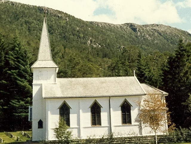 Midtgulen kirke